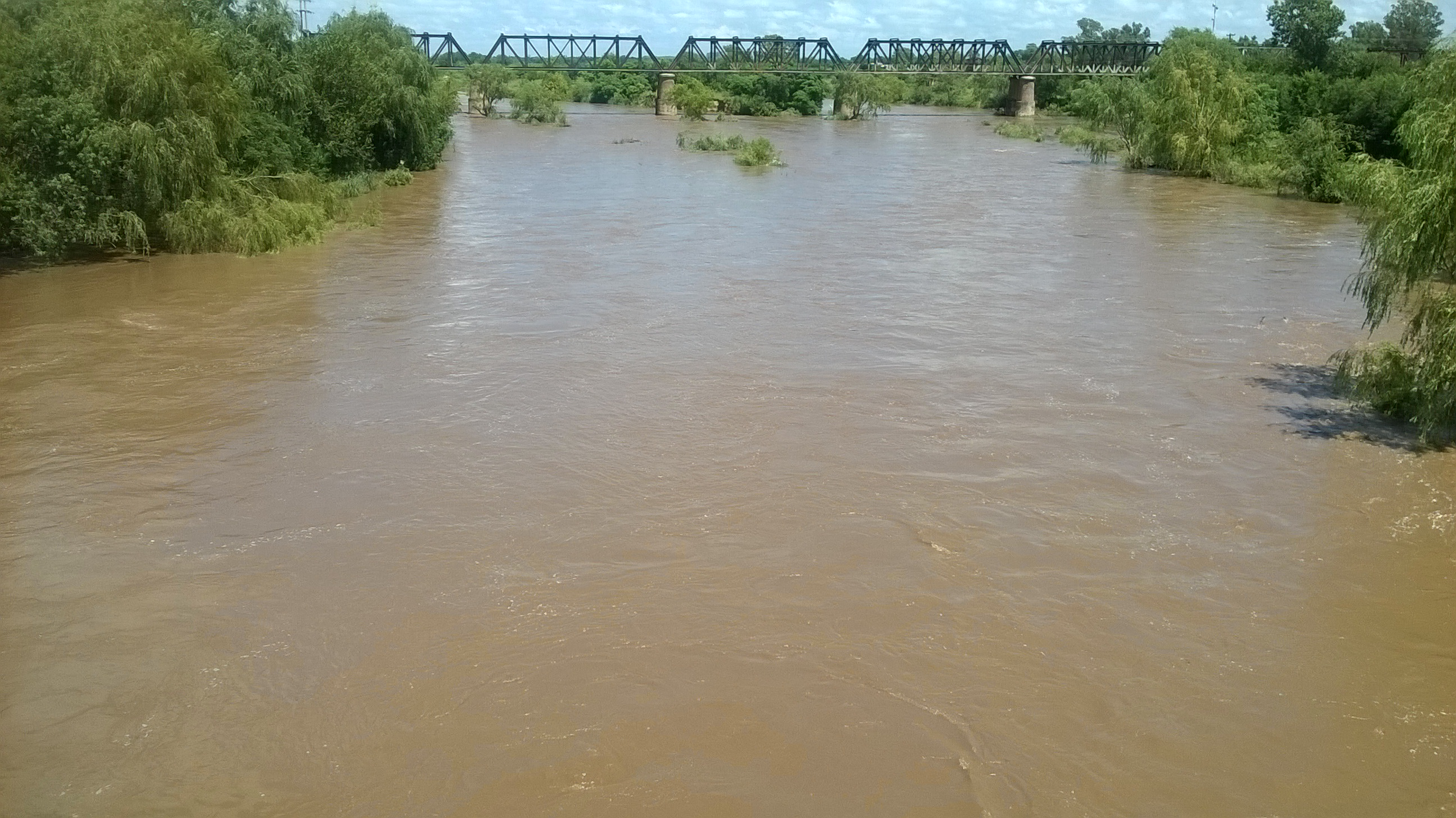 Puente negro, Río xanaes, Ciudad de Río Segundo